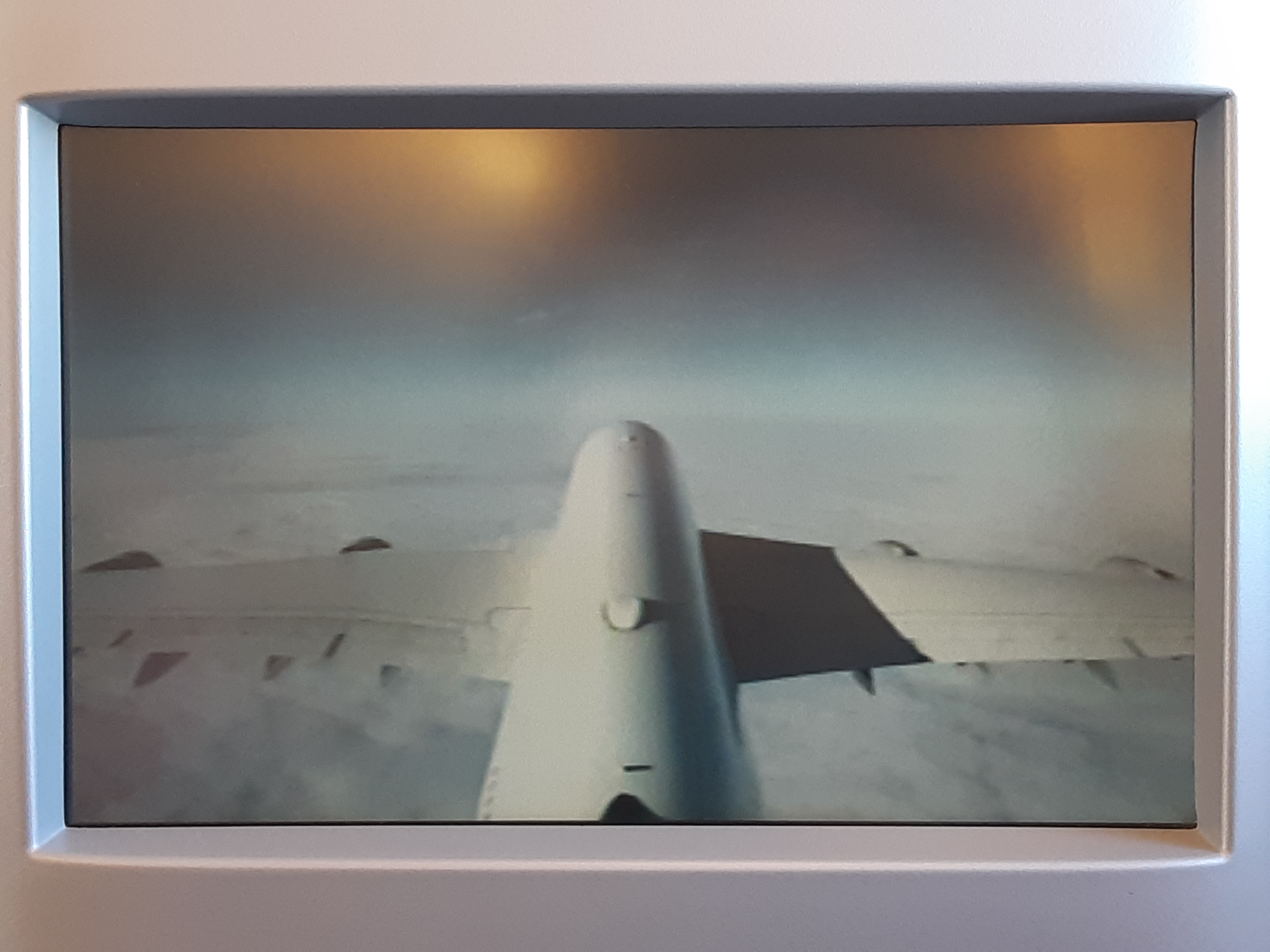 A380 Screen business class Lufthansa 2018 Ansicht Heckkamera